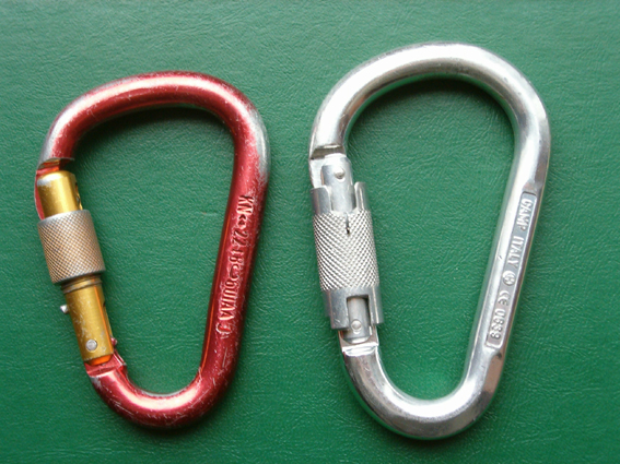 Foto schroef- en zelfsluitende karabijn - Klimmen / Materiaal